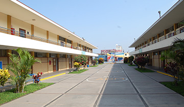 Pabellón secundaria Salesianos SFS